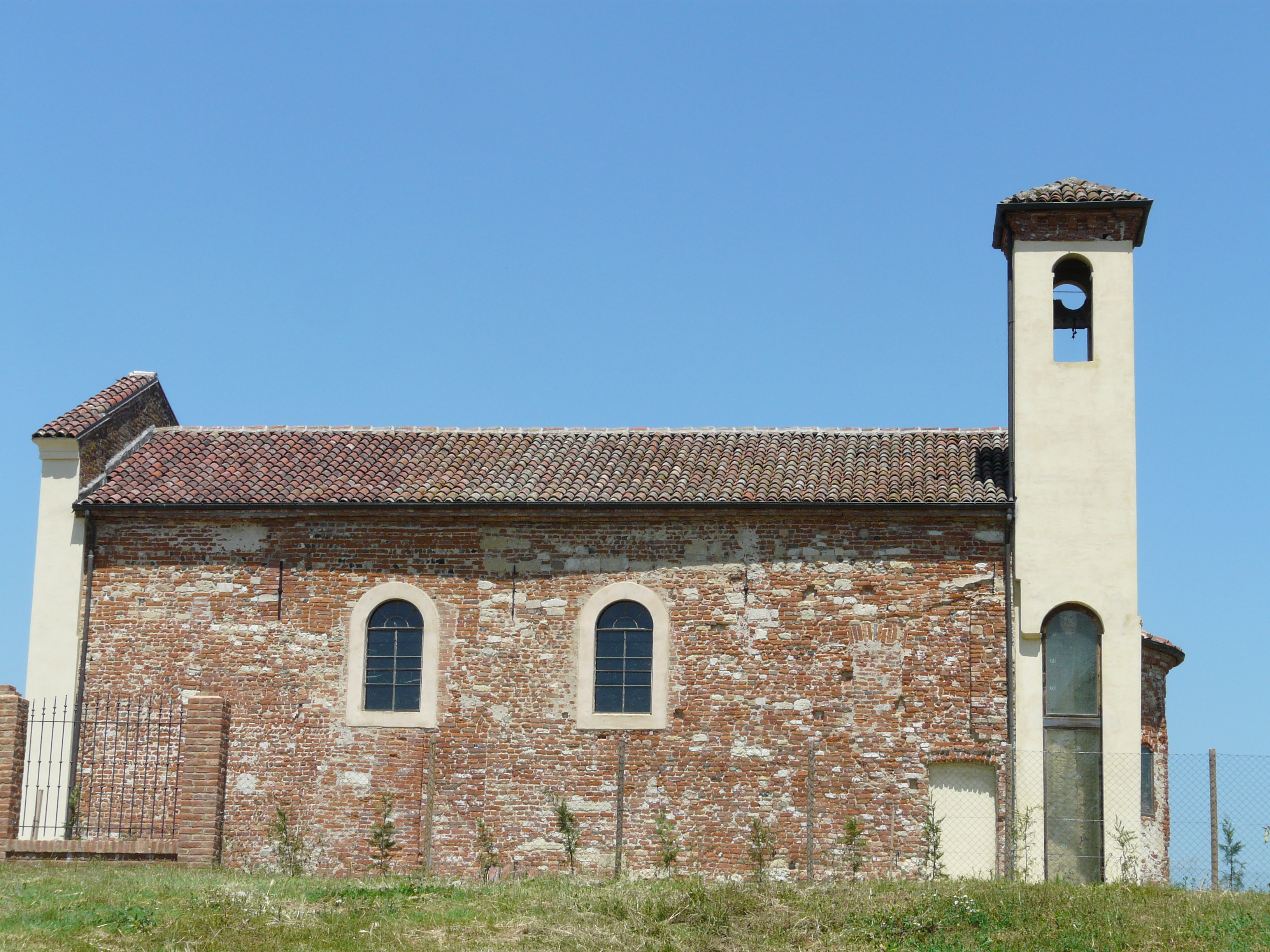 Complesso della pieve di San Giovanni di Mediliano, Lu, Piemonte, Italia